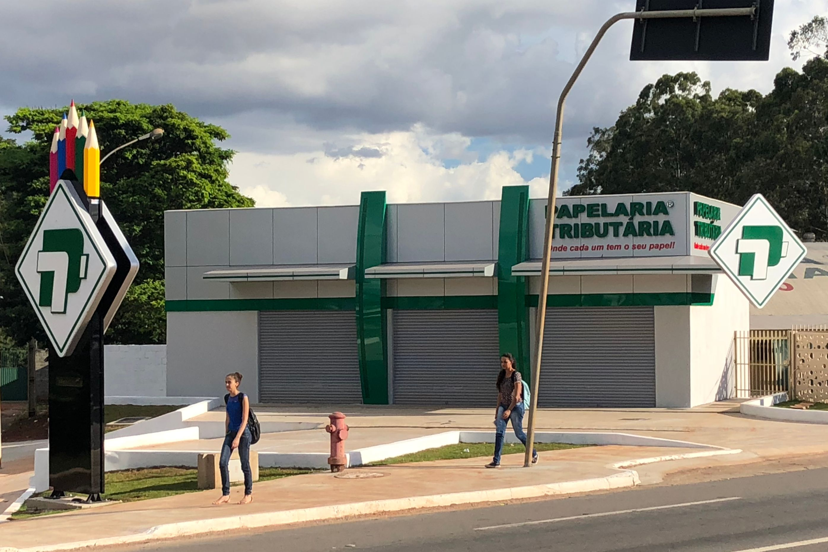 Fachada e Tóten em ACM prata, verde e preto, com letras caixa e luminosos - feita pela empresa FGL Comunicação Visual em Goiânia - GO